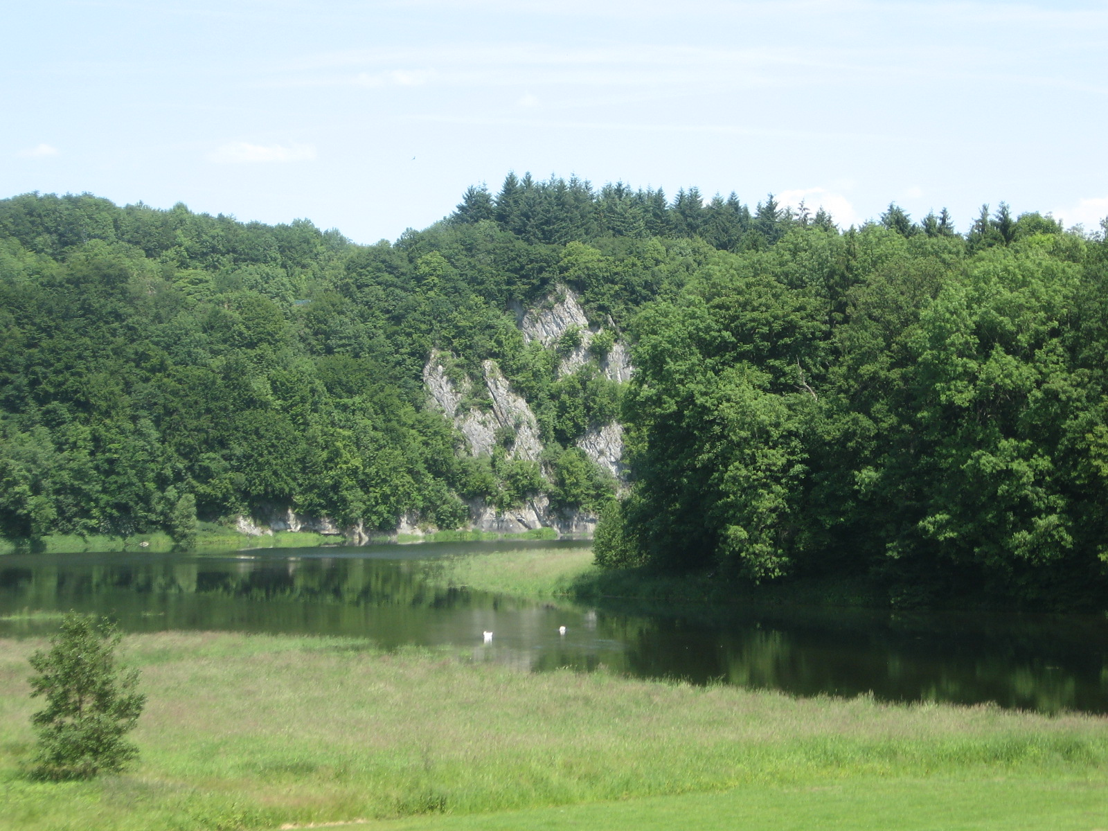 Teilansicht der Ahauser Klippen und des Ahauser Stausee bei Finntrop-Heggen von Westen gesehen